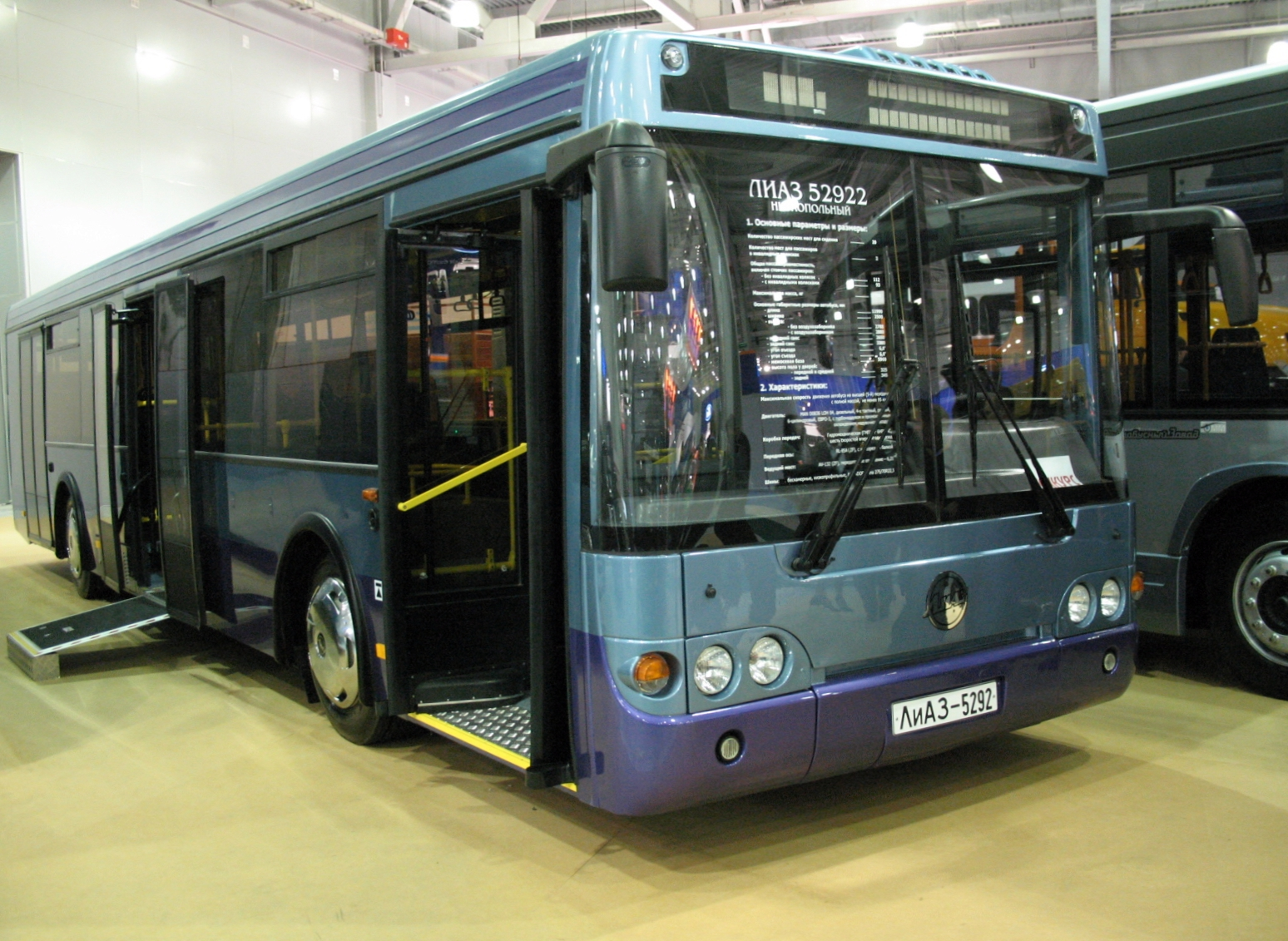 Автобус ЛИАЗ-5292.20 на ММАС-2007